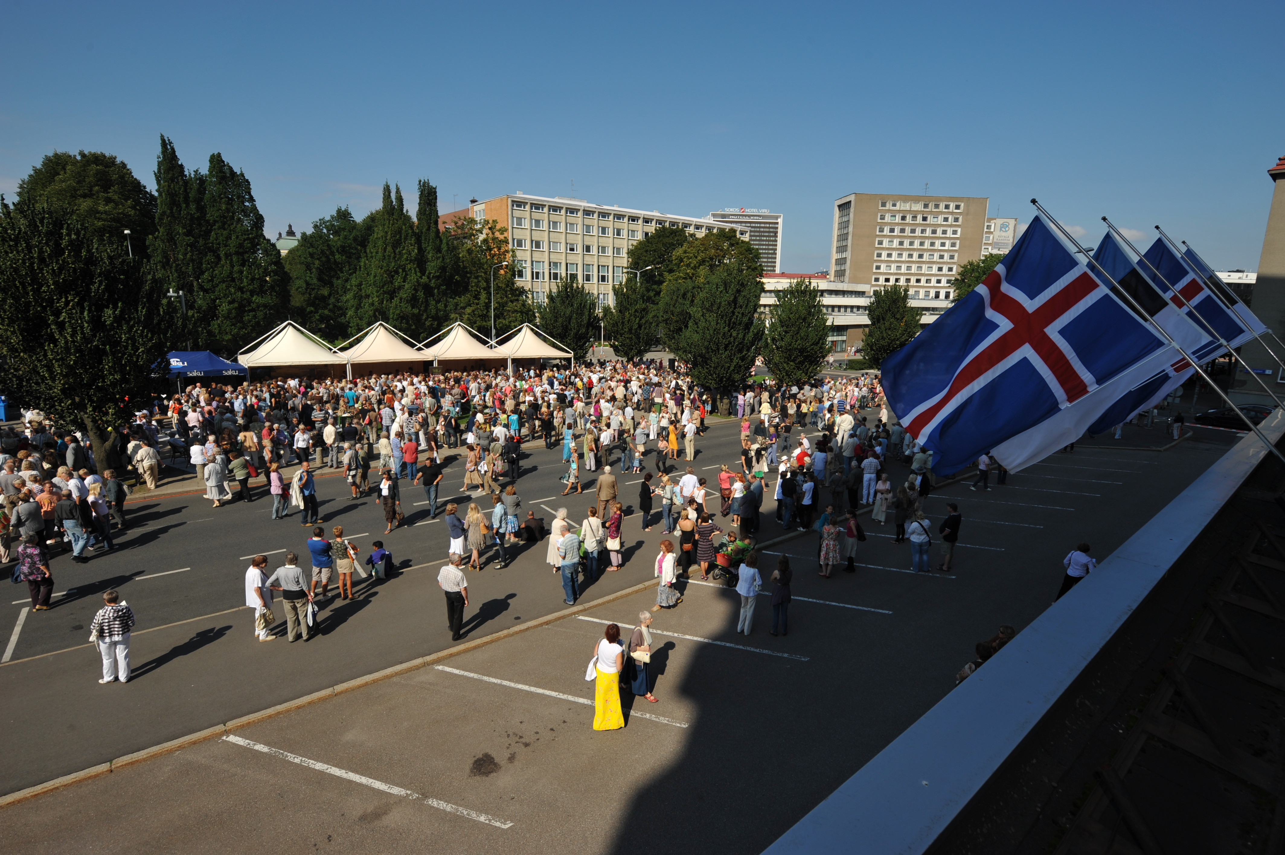 Islandi päev, toiduturg Islandi väljakul